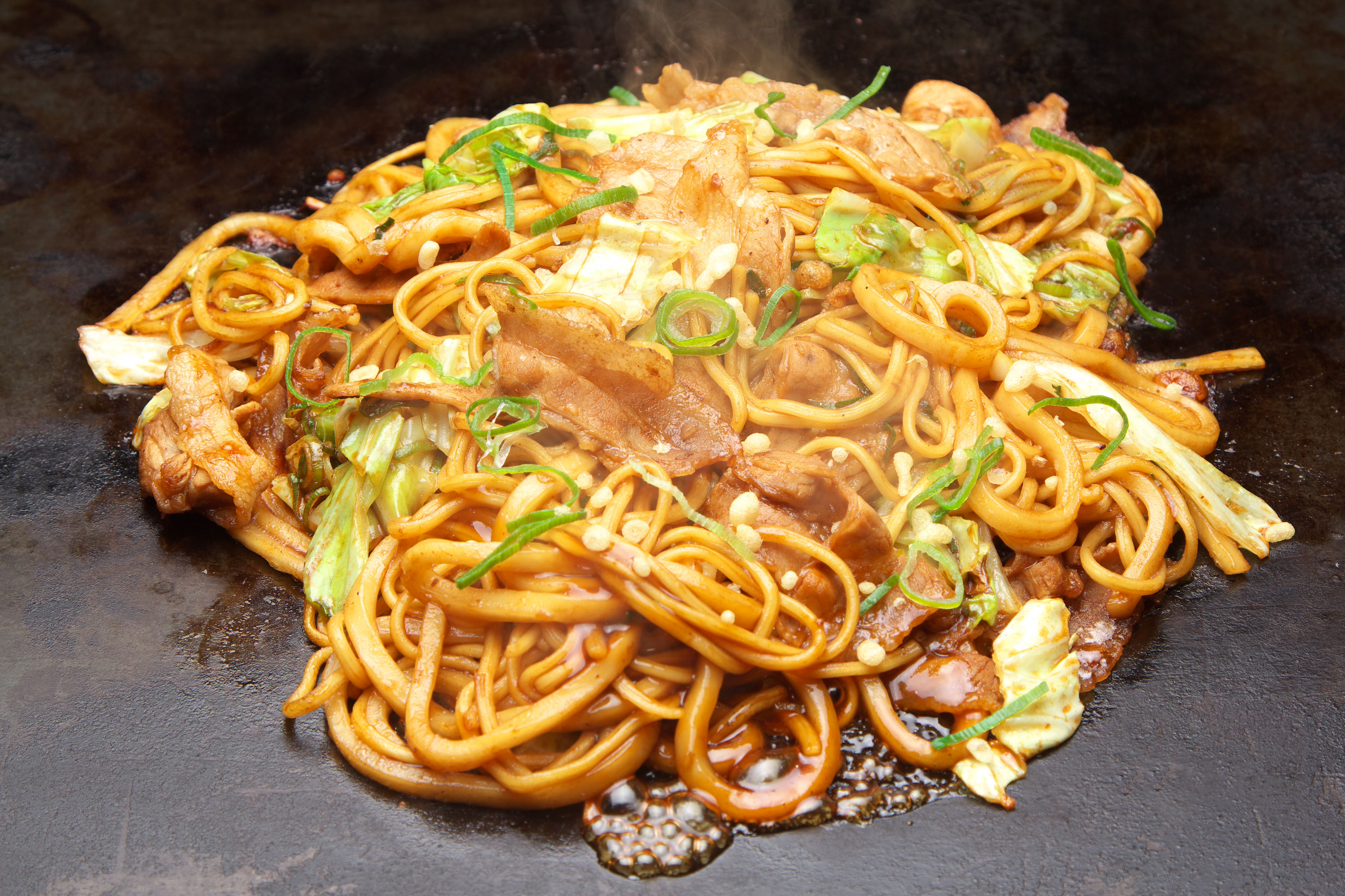 うまいもん横丁 兵庫県姫路市周辺で食べられるご当地グルメで、うどんとそばという太さの違う麺をあわせて焼いて、ソース等で味を調えたもの。